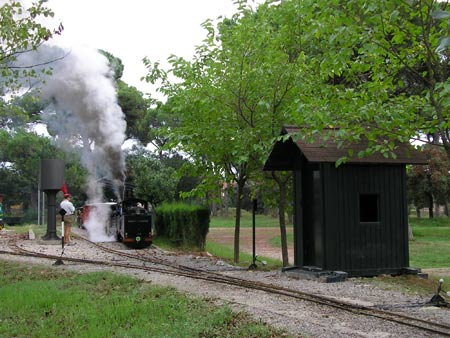 Fotografía del parque de l'Hostal del Fum, en Palau-solità i Plegamans.